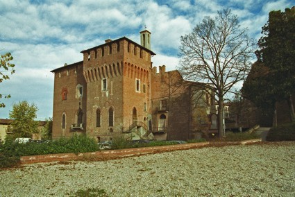 Il castello di San Colombano al Lambro (MI)